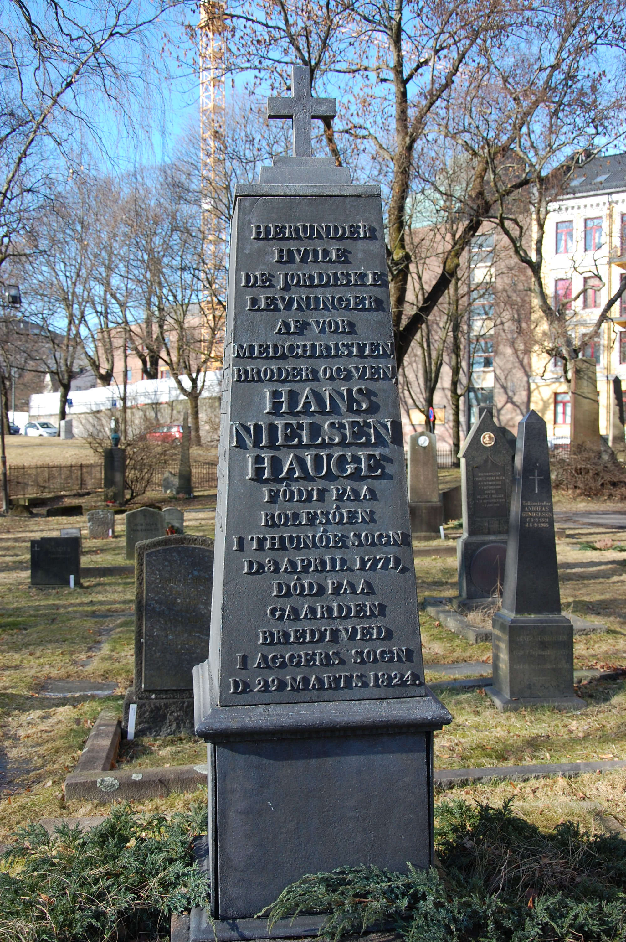 Hans Nielsen Hauge, gravminne på Gamle Aker kirkegård, Oslo